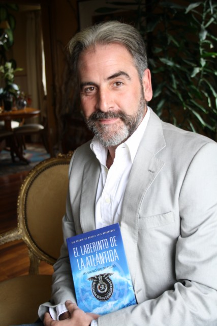 La foto fue tomada con motivo de la entrevista que realizó el autor en el programa de radio La calle de los libros